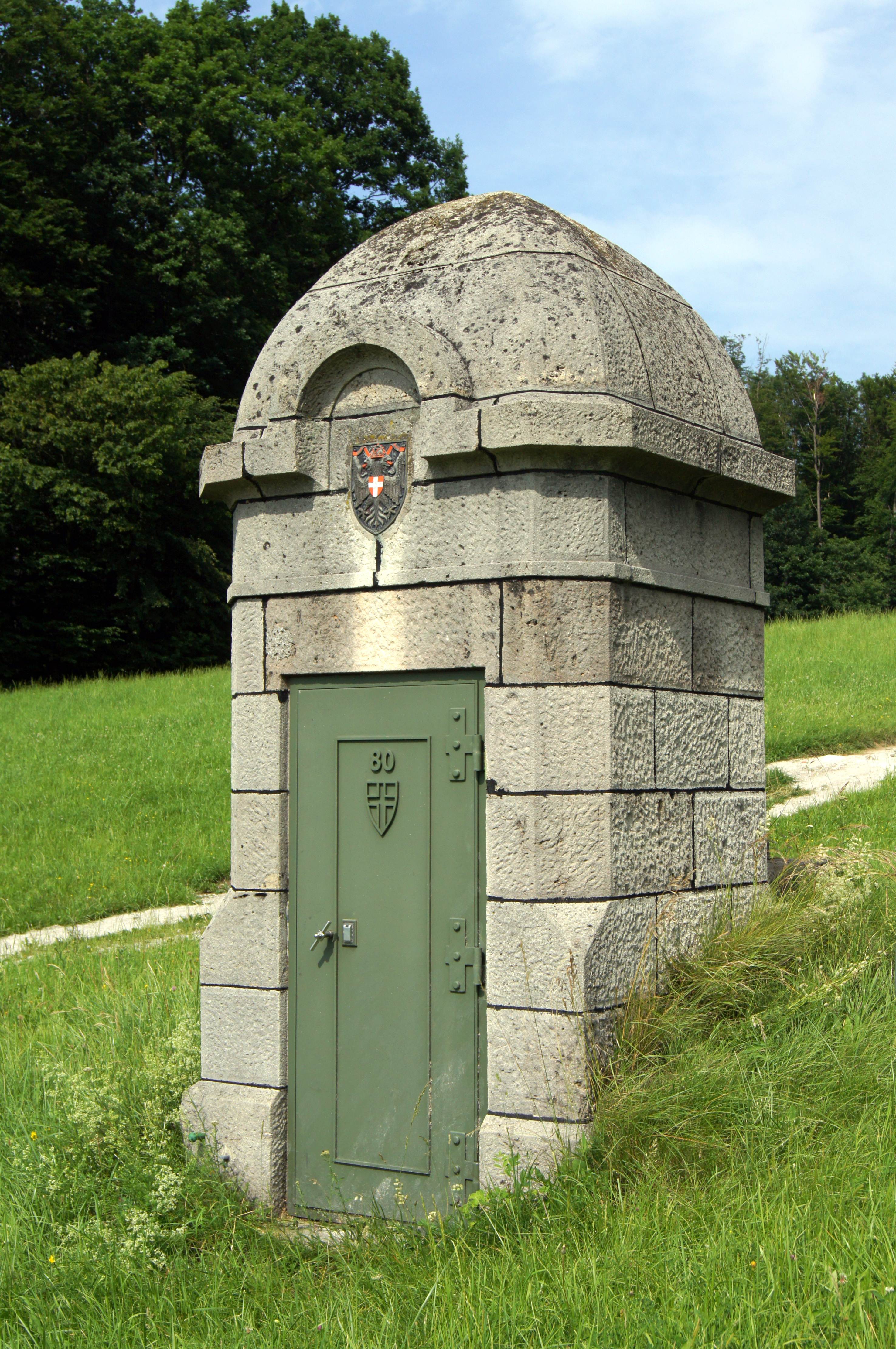 Einsteigturm 80 der II. Wr. HQL